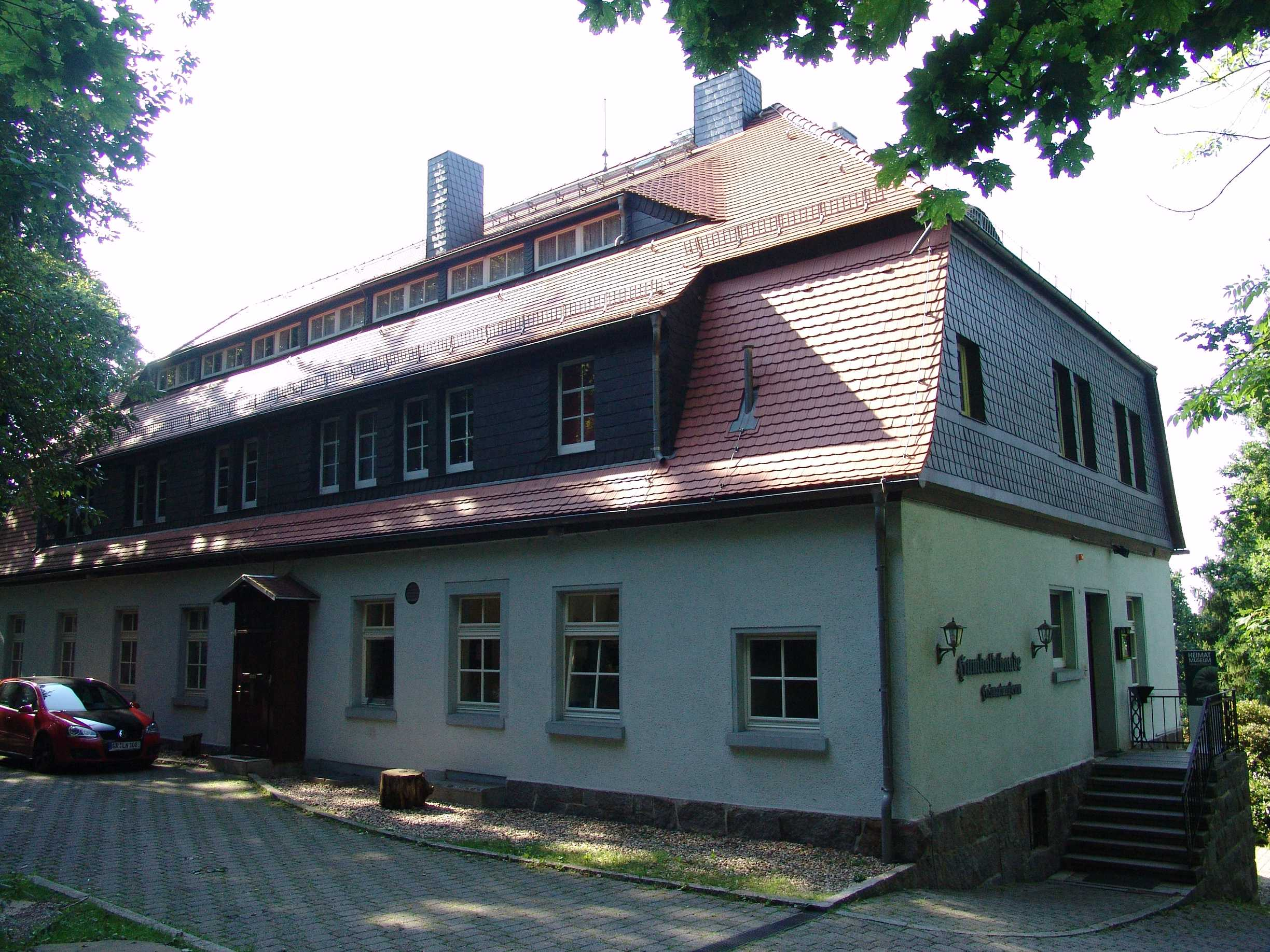 Humboldbaude Schlechteberg in Ebersbach/Sa., Landkreis Görlitz, Sachsen